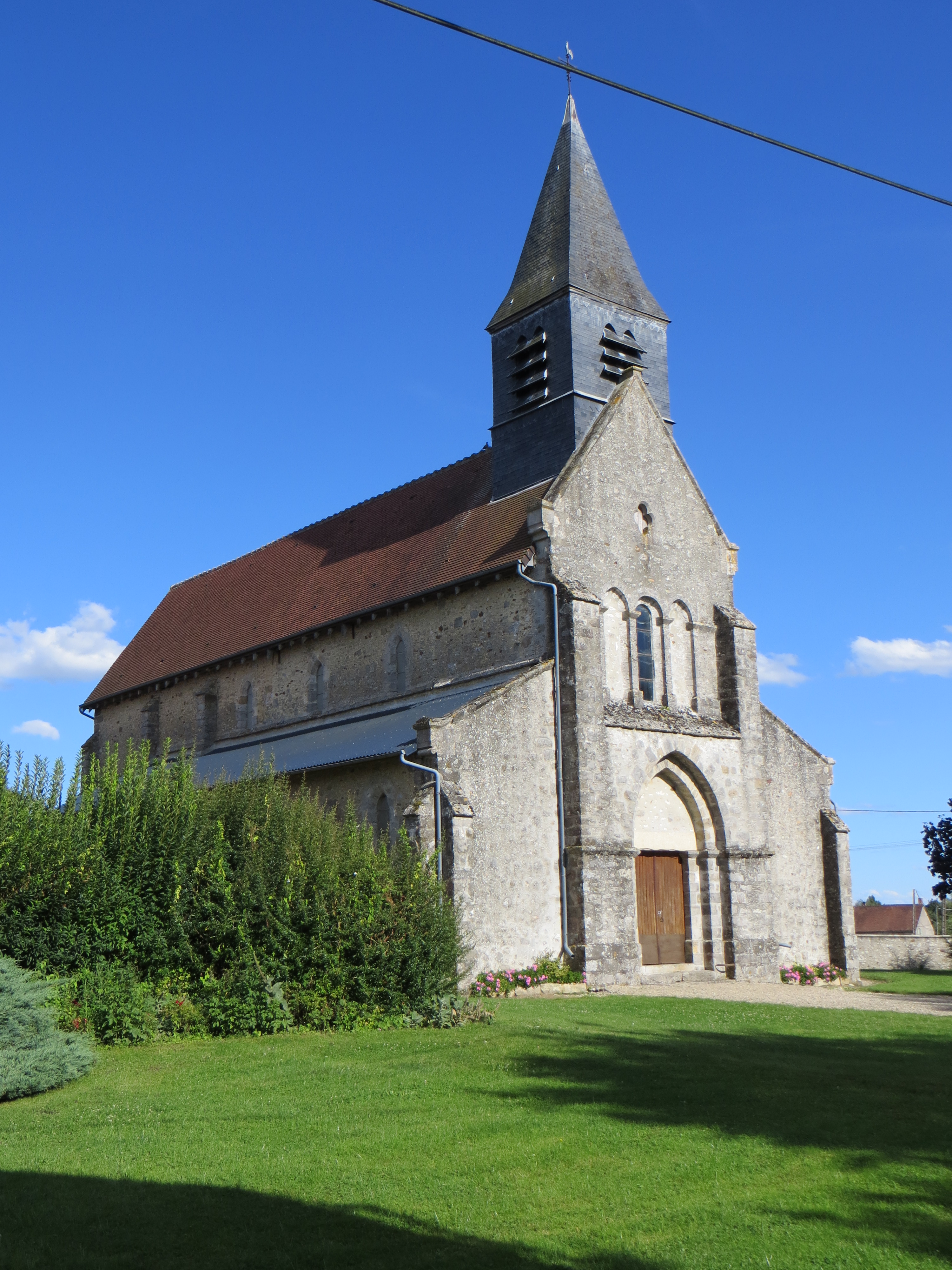 Vue générale de l'église